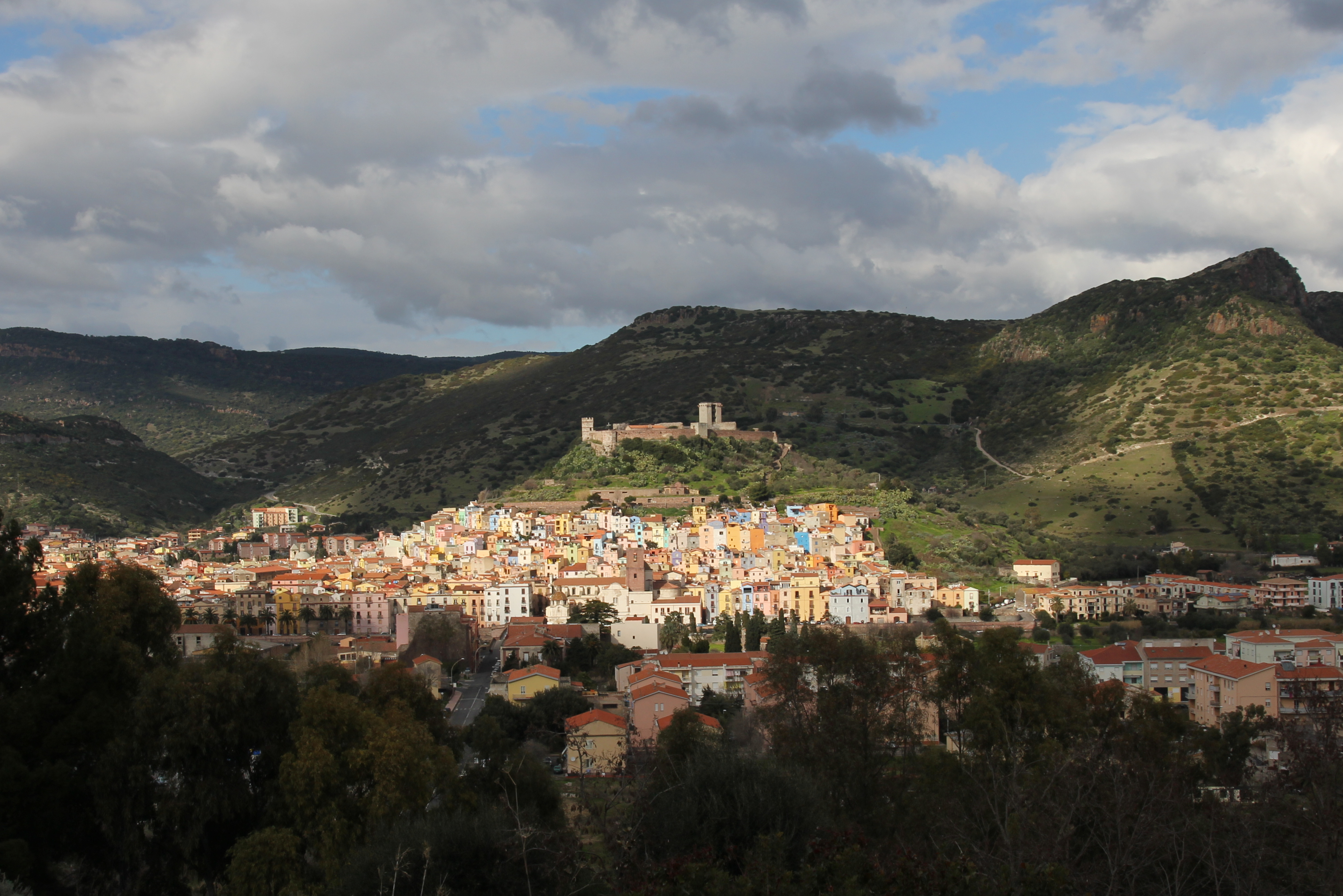 Bosa - Panorama